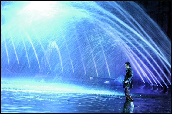 Op het eiland van Brienoord speelde Vis à Vis Onderstroom in 2003